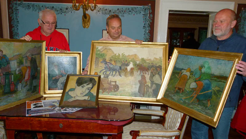 A gyűjtők bemutatják az öt új József Dezső képet